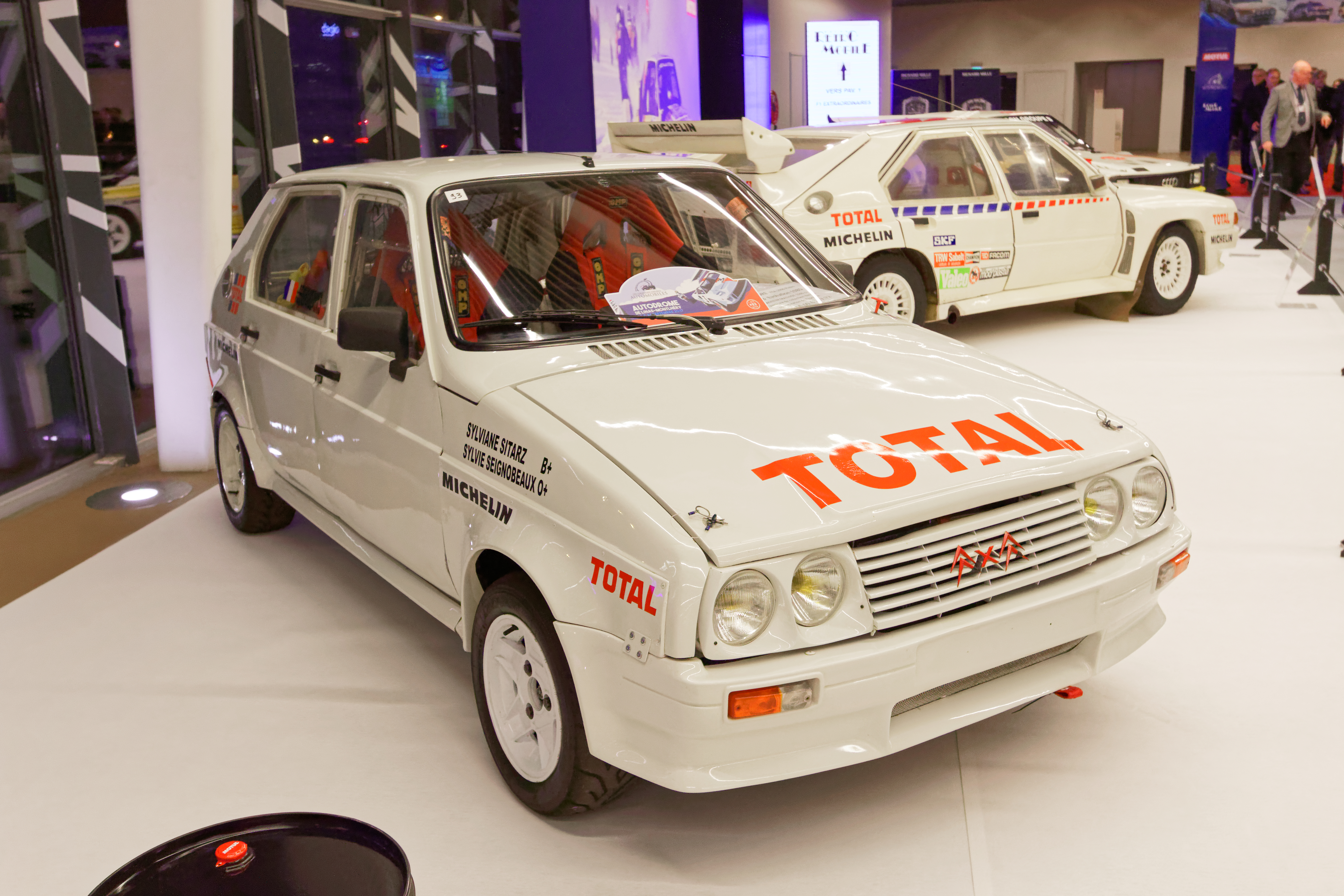 Une Citroën Visa 1000 pistes de 1984 exposée lors du salon Rétromobile 2017.